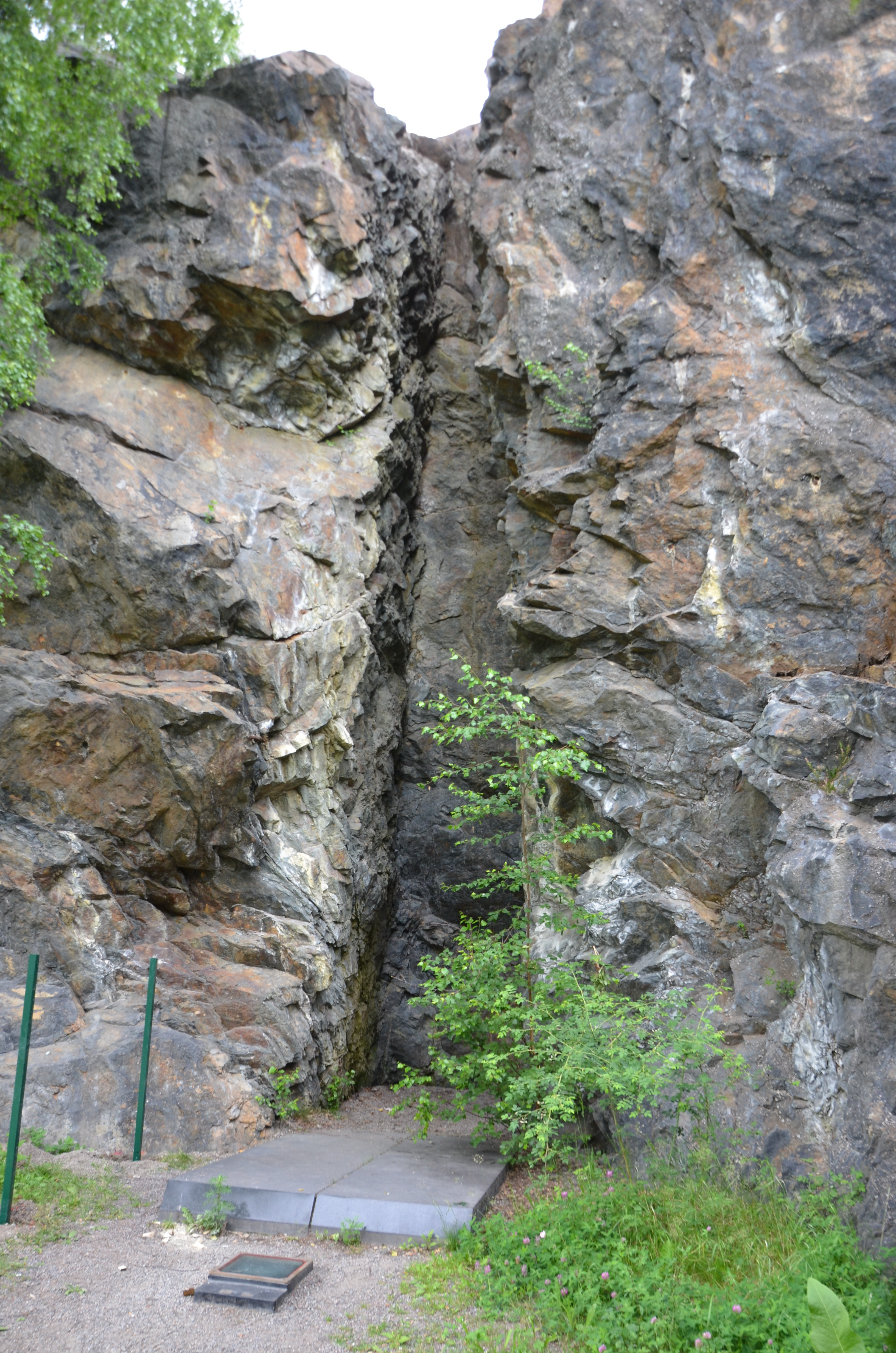 Bergskatedral av Stina Ekman, 1996, nära ångbåtsbryggan i Vinterviken i Stockholm